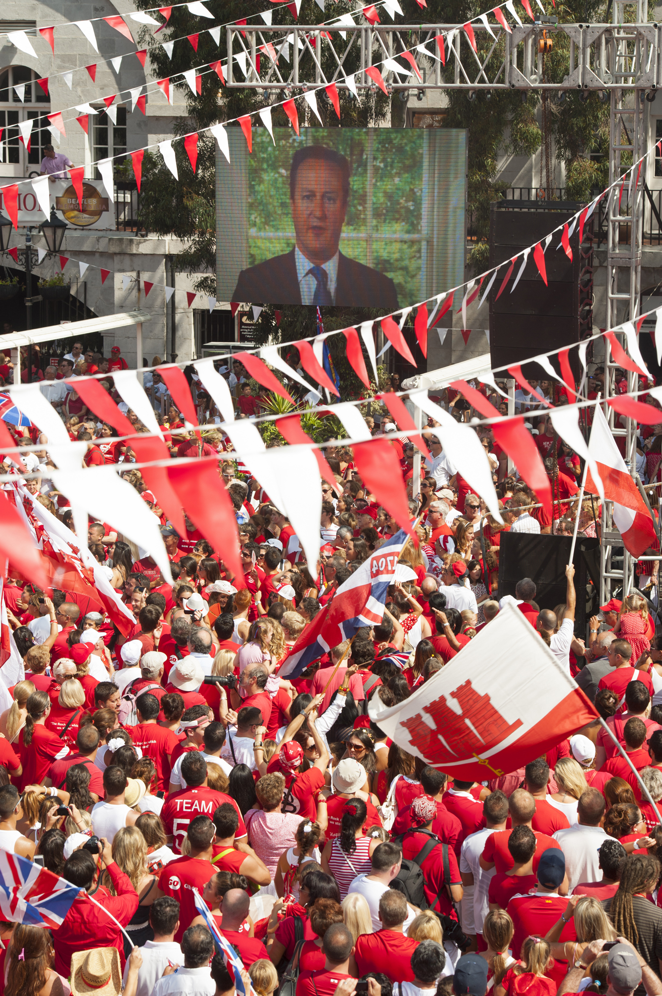 Los congregados en la plaza de Casemates escuchan el mensaje del Primer Ministro británico, David Cameron